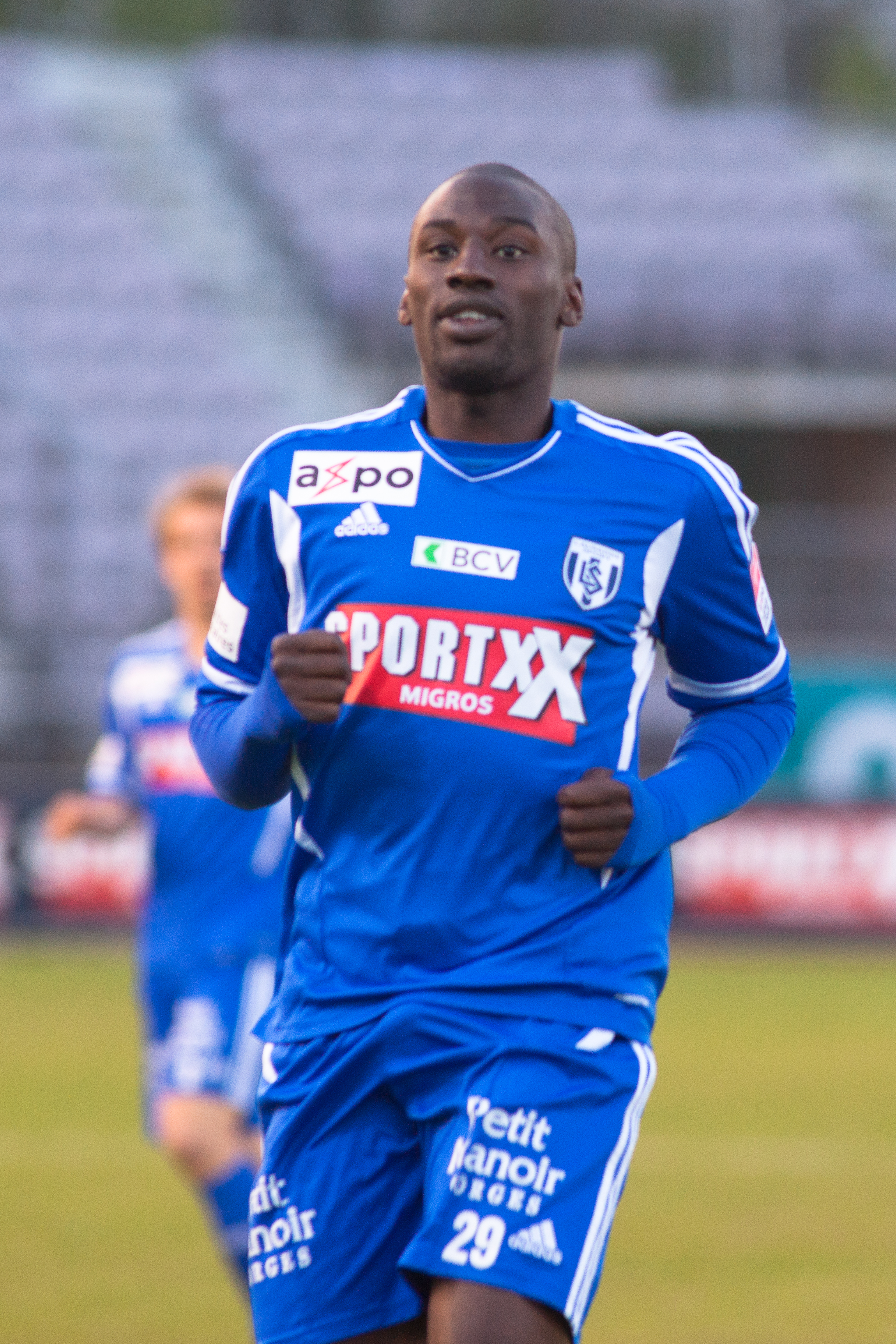 Matt Moussilou - Lausanne vs Sion 02 may 2012